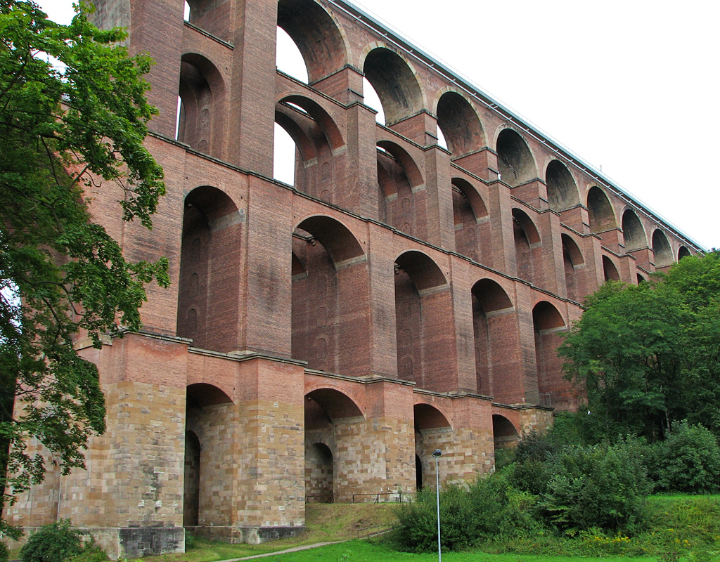 Göltzschtalbrücke